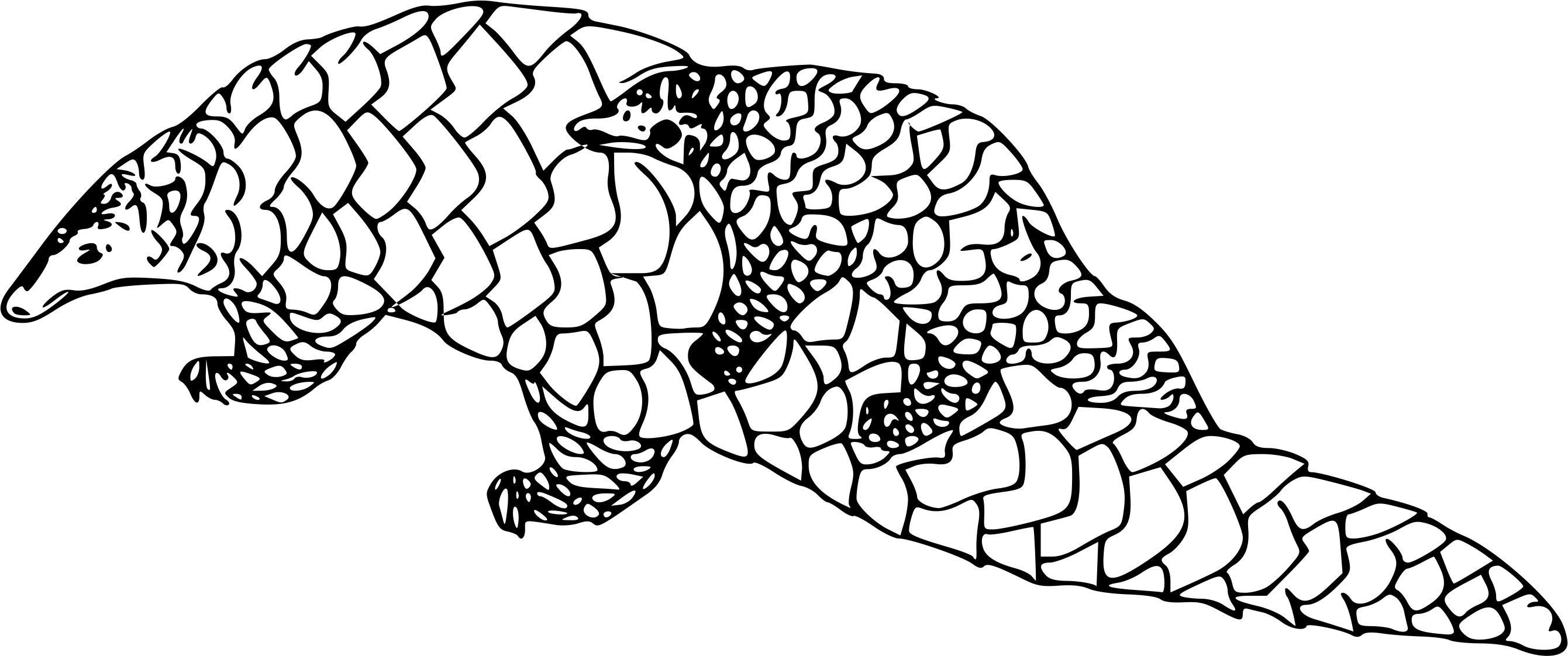 recadrage